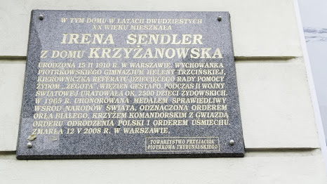 Tablica pamiątkowa poświęcona Irenie Sendlerowej na ścianie kamienicy przy ul. 3 Maja 14 w Piotrkowie Trybunalskim; odsłonięta 2 IX 2009 roku.